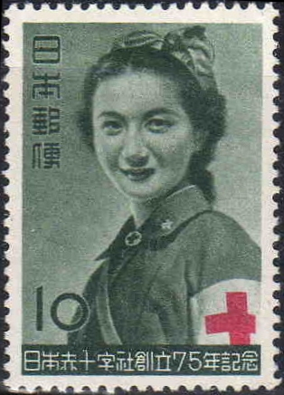 日本赤十字社創立75周年記念切手のうち10円切手。描かれているのは当時の女性看護士。